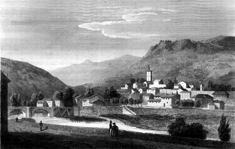 Image en provenance du livre : Eusèbe Girault de Saint-Fargeau, Guide pittoresque du voyageur en France, contenant la statistique et la description complète des quatre-vingt-six départements, orné de 740 vignettes et portraits gravés sur acier, de quatre-vingt-six cartes de départements et d'une grande carte routière de la France, par une Société de gens de lettres, de géographes et d'artistes, Paris, F. Didot frères, 1838, 6 volumes in-8° (BNF : 8-L25- 46). Volume III Didot frères, 1838. Route de Paris à Nice traversant les départements de l'Isère, des Hautes-Alpes, des Basses-Alpes et du Var. auteurs dessins : Rauch (ou autre) auteurs gravures : Skelton fils, Schroeder, Bishop (ou autre)